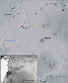 Lageplan der spätneolithischen Siedlung Shir, Syrien